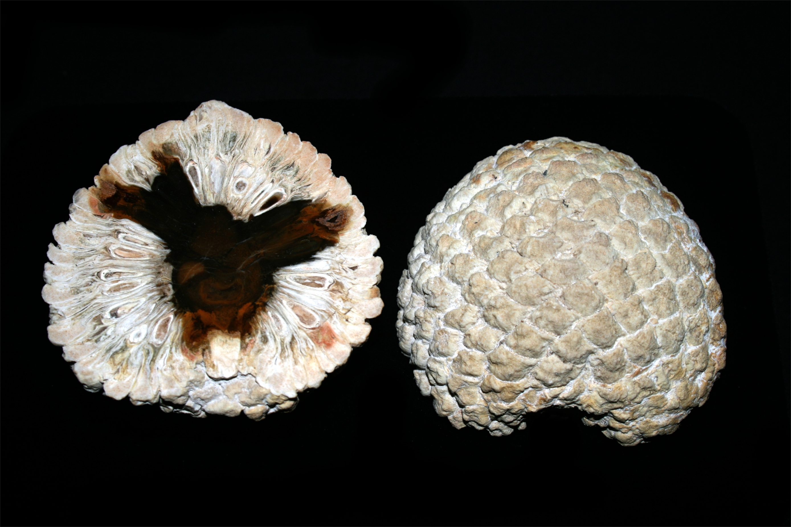 Petrified Araucaria mirabilis Cone(Araucaria);Age: Jurassic (approx. 160 mya);Location: Patagonia, Argentina